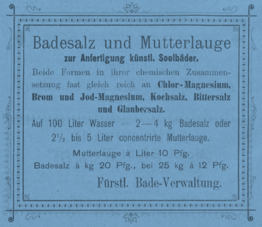 Anzeige der Fürstlichen Bade-Verwaltung Salzuflen 'Badesalz und Mutterlauge' vom April 1899